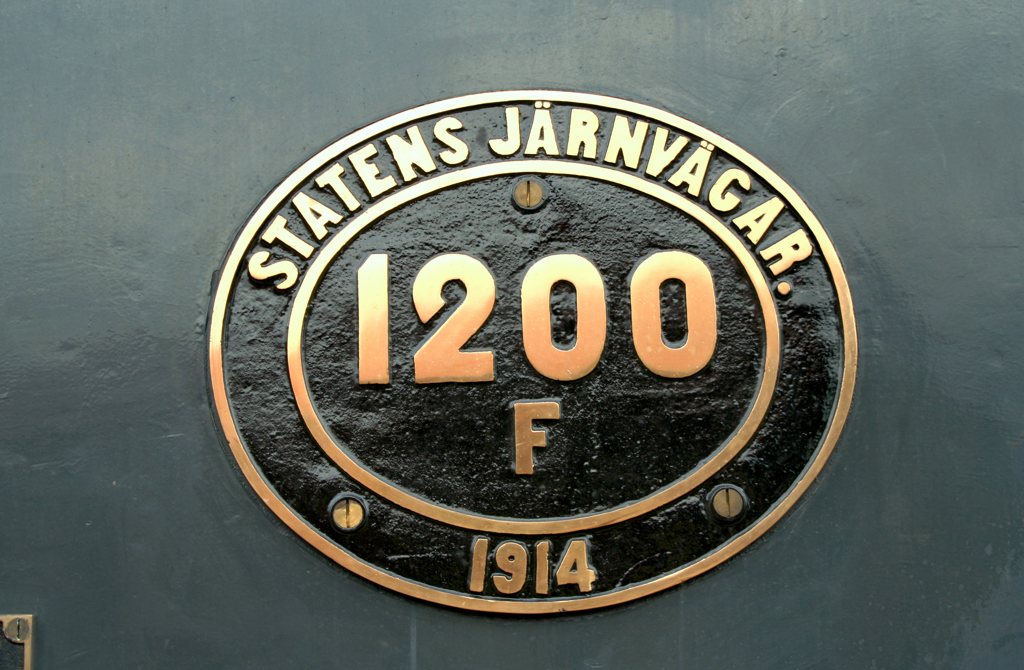 Nummernschild der SJ-Dampflok F 1200 in Gävle am 13.August 2008